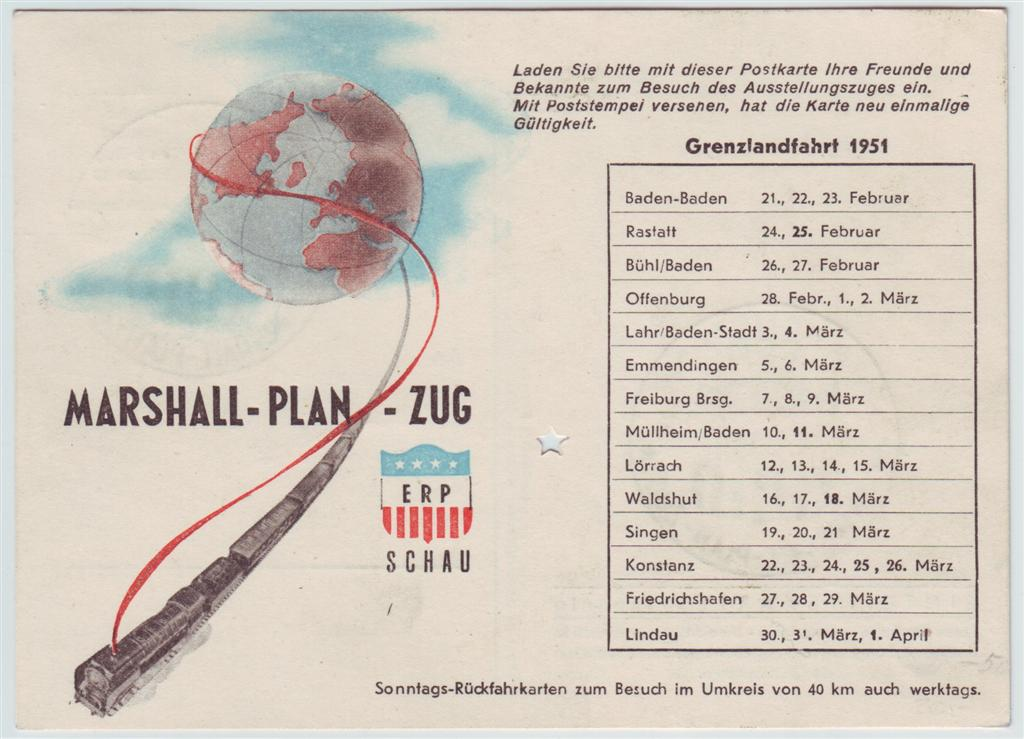 Timetable